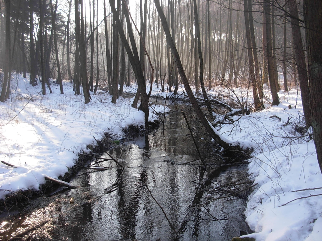 Struga Młyńska – dopływ Kanału Bydgoskiego w dolinie Podprądy na granicy gminy Białe Błota i osiedla Miedzyń-Prądy w Bydgoszczy